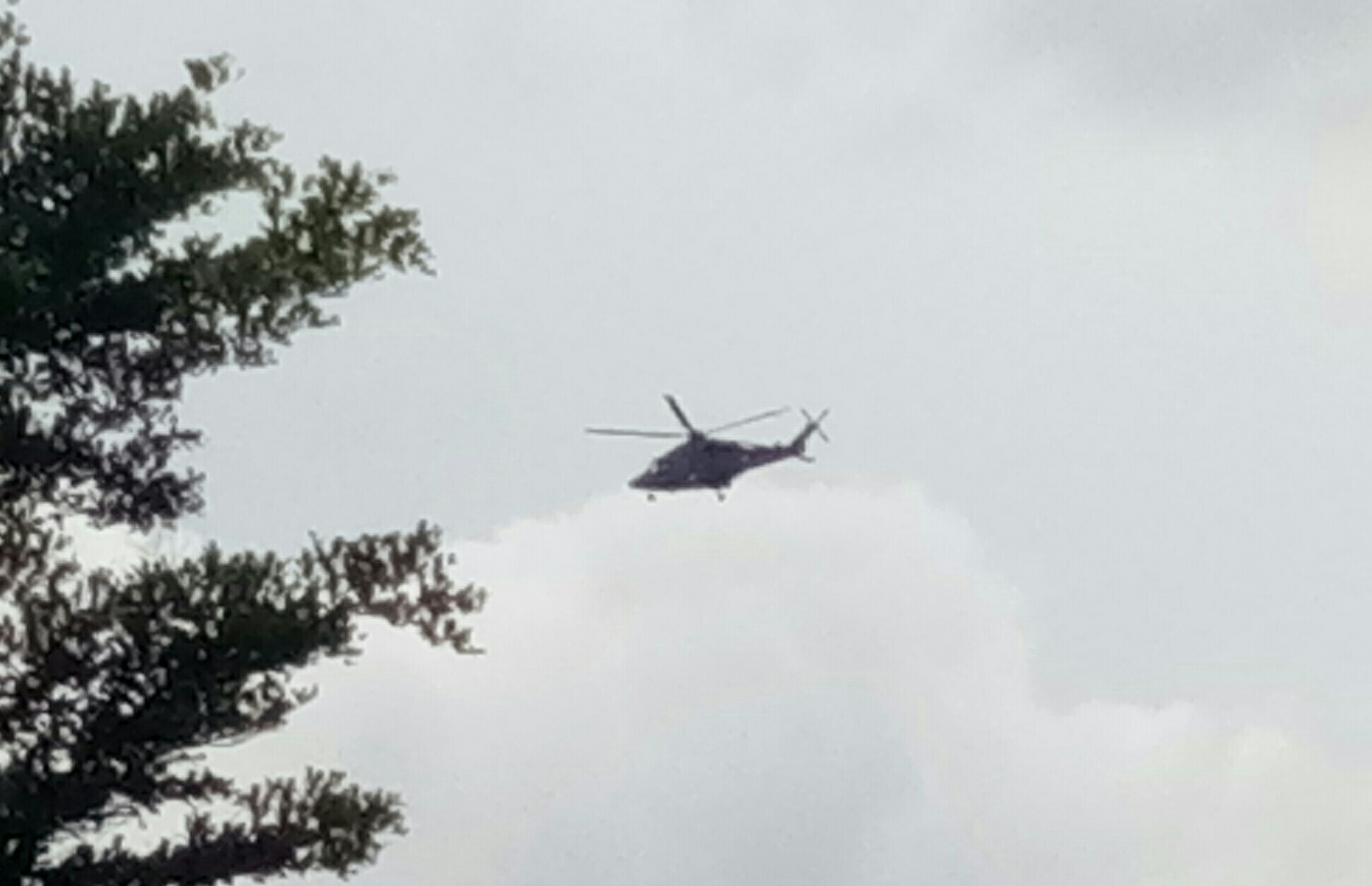 ภาพของการลำเลียงสมาชิกในทีมฟุตบอลหมู่ป่า อเคดามี และผู้ช่วยผู้ฝึกสอน ผ่านทางน่านฟ้า